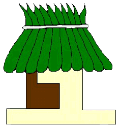 Glifo o escudo de armas del municipio de Tolcayuca